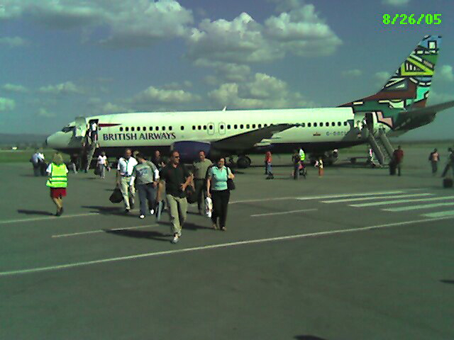 Prishtina airport Kosova